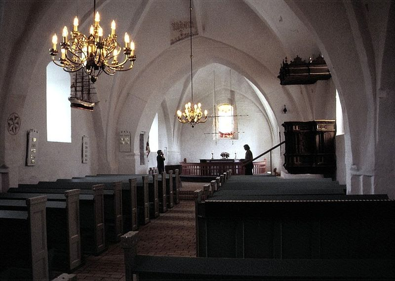 Gelsted Kirke i Danmark. Skibet set mod øst